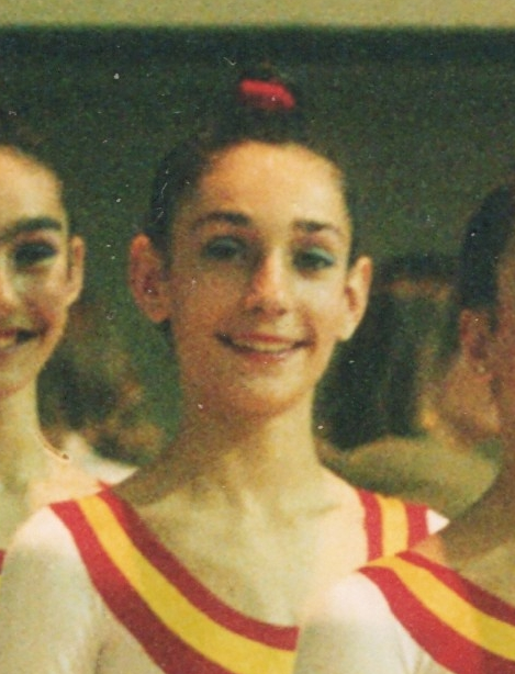 Verónica Bódalo, que fue campeona de Europa júnior en 1991 con el conjunto júnior español, durante una exhibición en el Gimnasio Moscardó de Madrid ese mismo año.